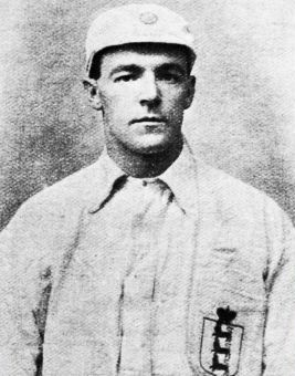 Джордж Хілсдон - англійський футболіст